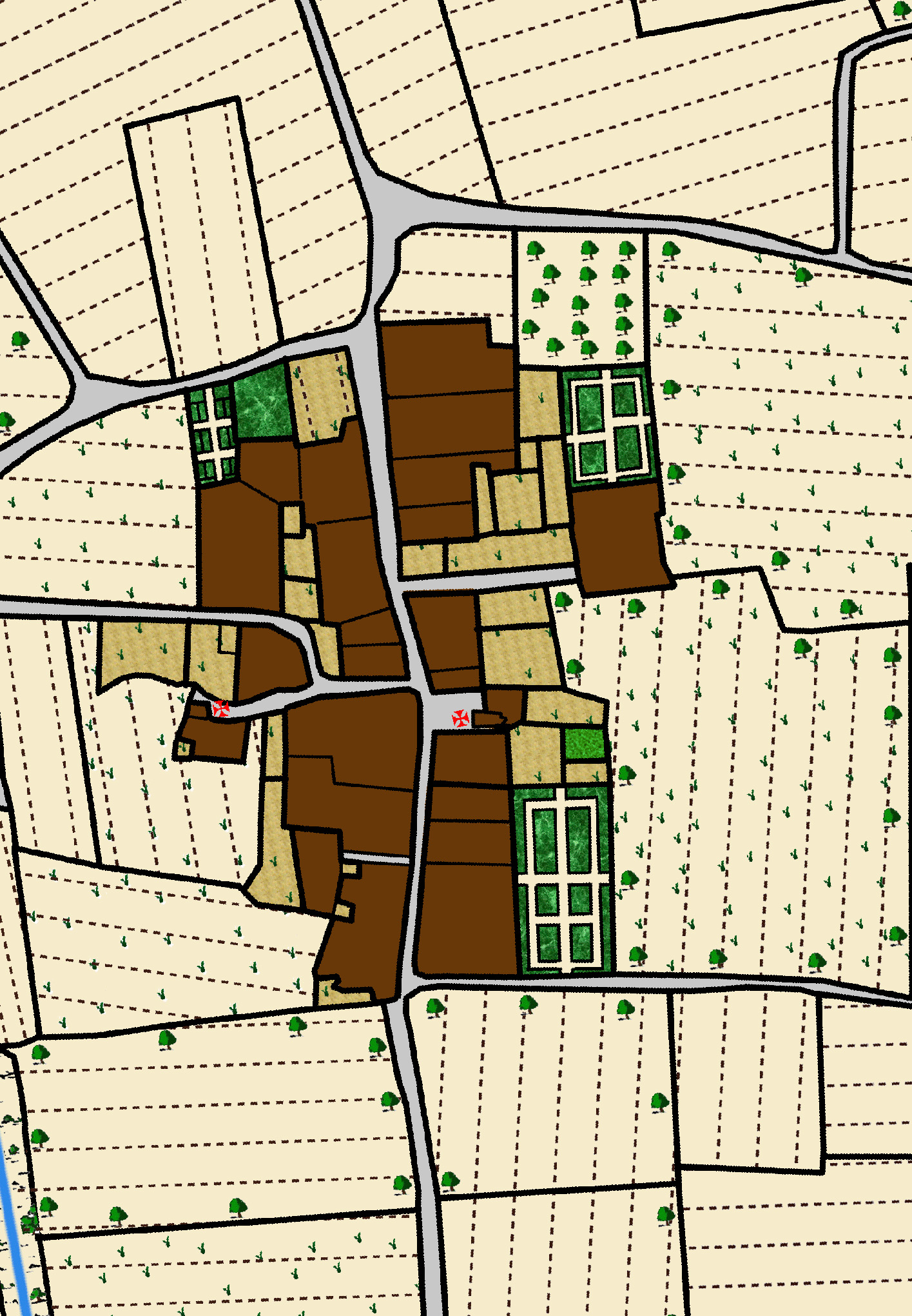 Il centro di Arese come di presenta nelle mappe del catasto Teresiano.